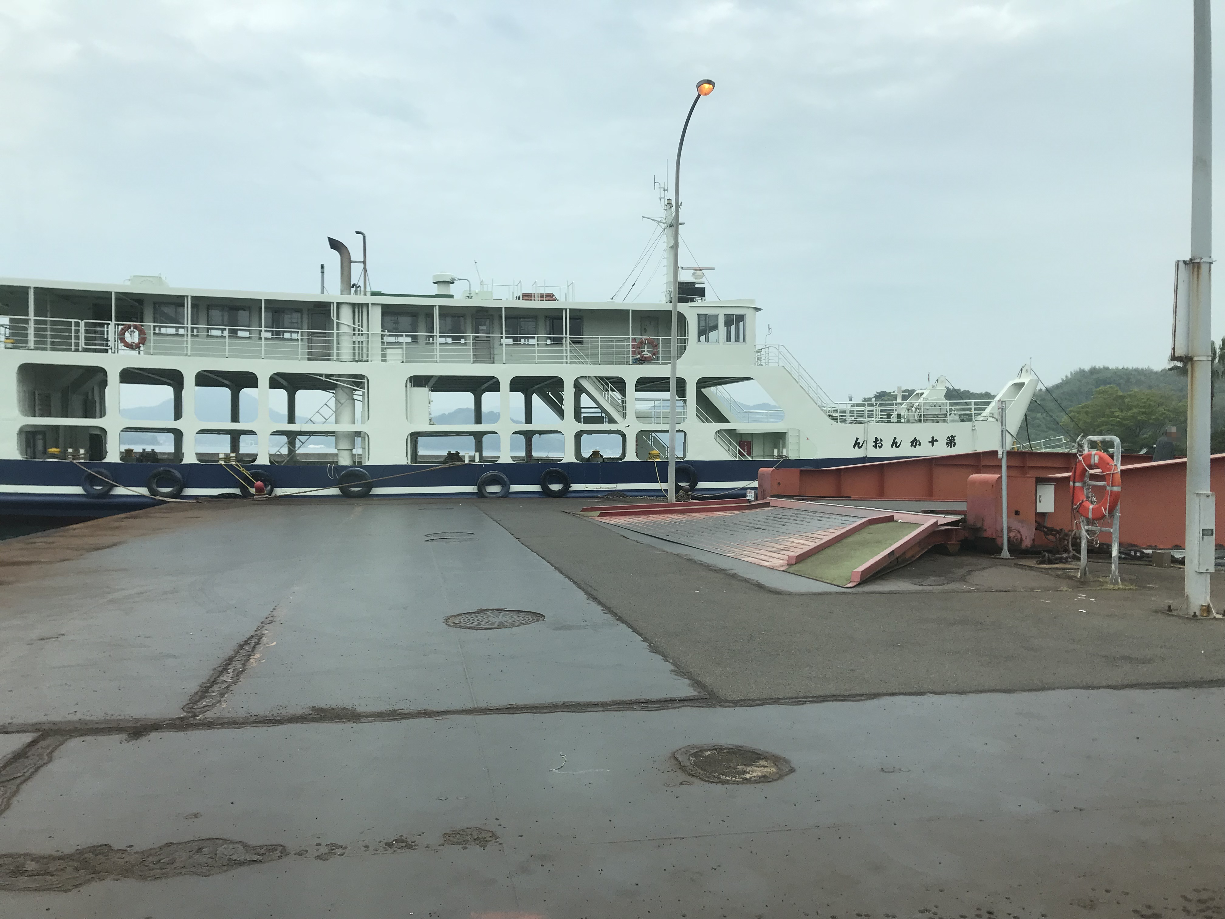 土生港行きの高速船より望む鷺港の桟橋